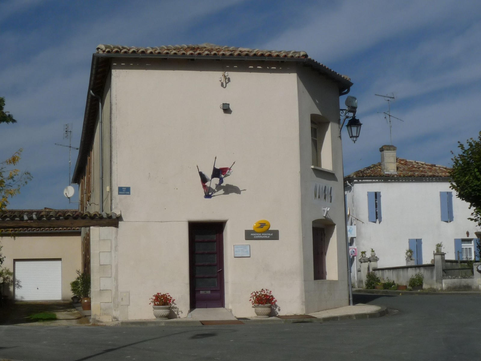 Mairie et poste de Tugéras, Charente-Maritime, France